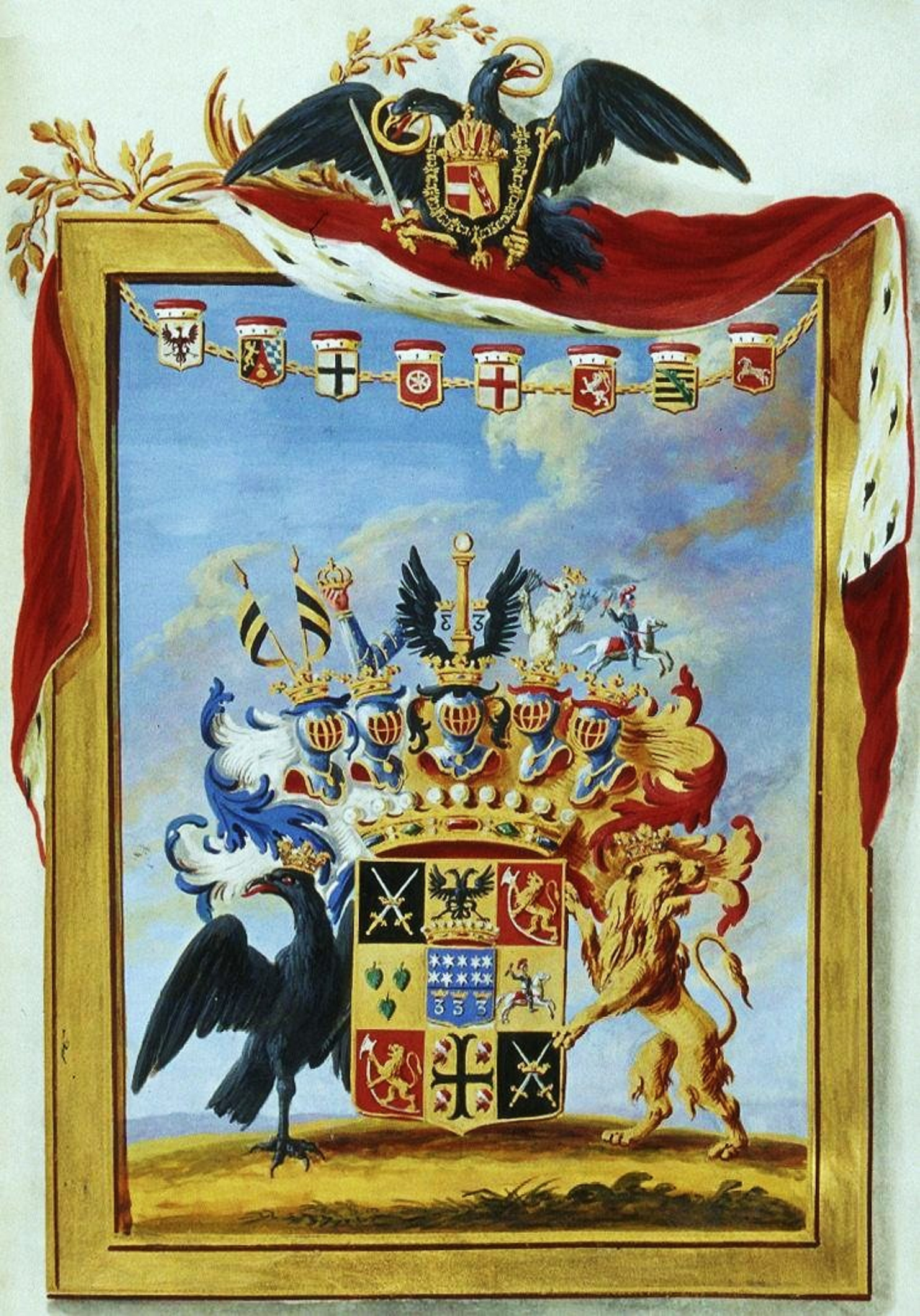 Wappen im Reichsgrafendiplom, verliehen von Joseph II., Kaiser des Heiligen Römischen Reiches, an Otto Magnus von Rehbinder, Generalfeldmarschall.